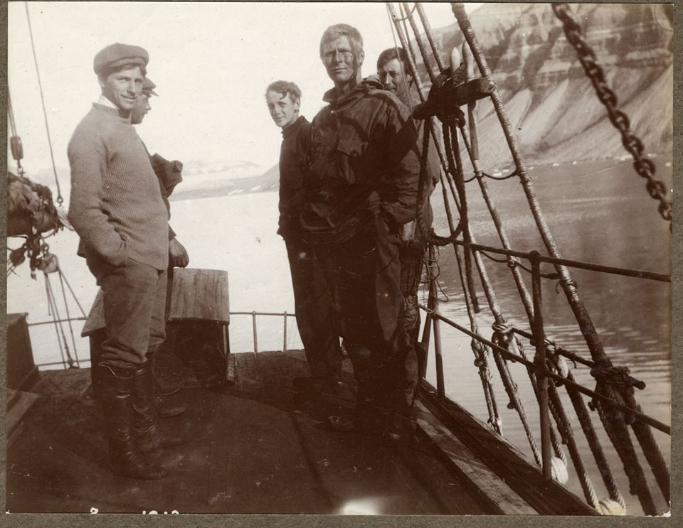 Fangstmannen Hilmar Nøis